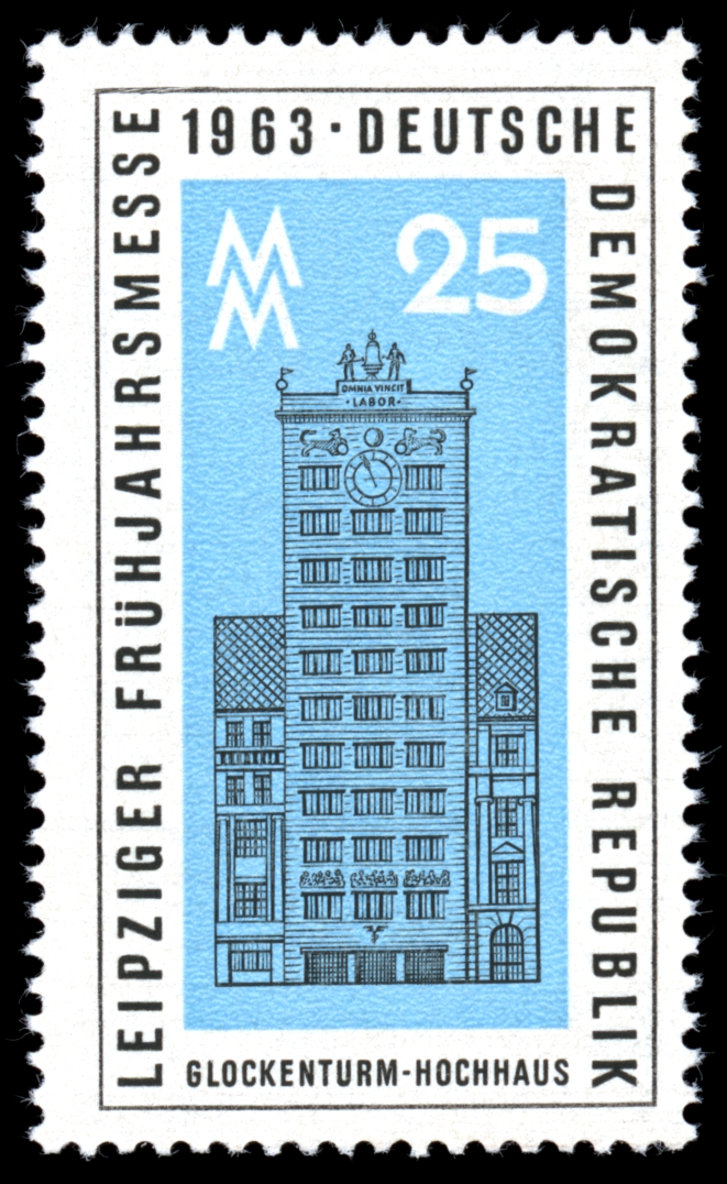 Information: Glockenturm Krochhaus Ausgabepreis: 25 Pfennig First Day of Issue / Erstausgabetag: 6 February 1963 Auflage: 4.000.000 Entwurf: Dorfstecher Druckverfahren: Michel-Katalog-Nr: 949 Ländercode-MiNr